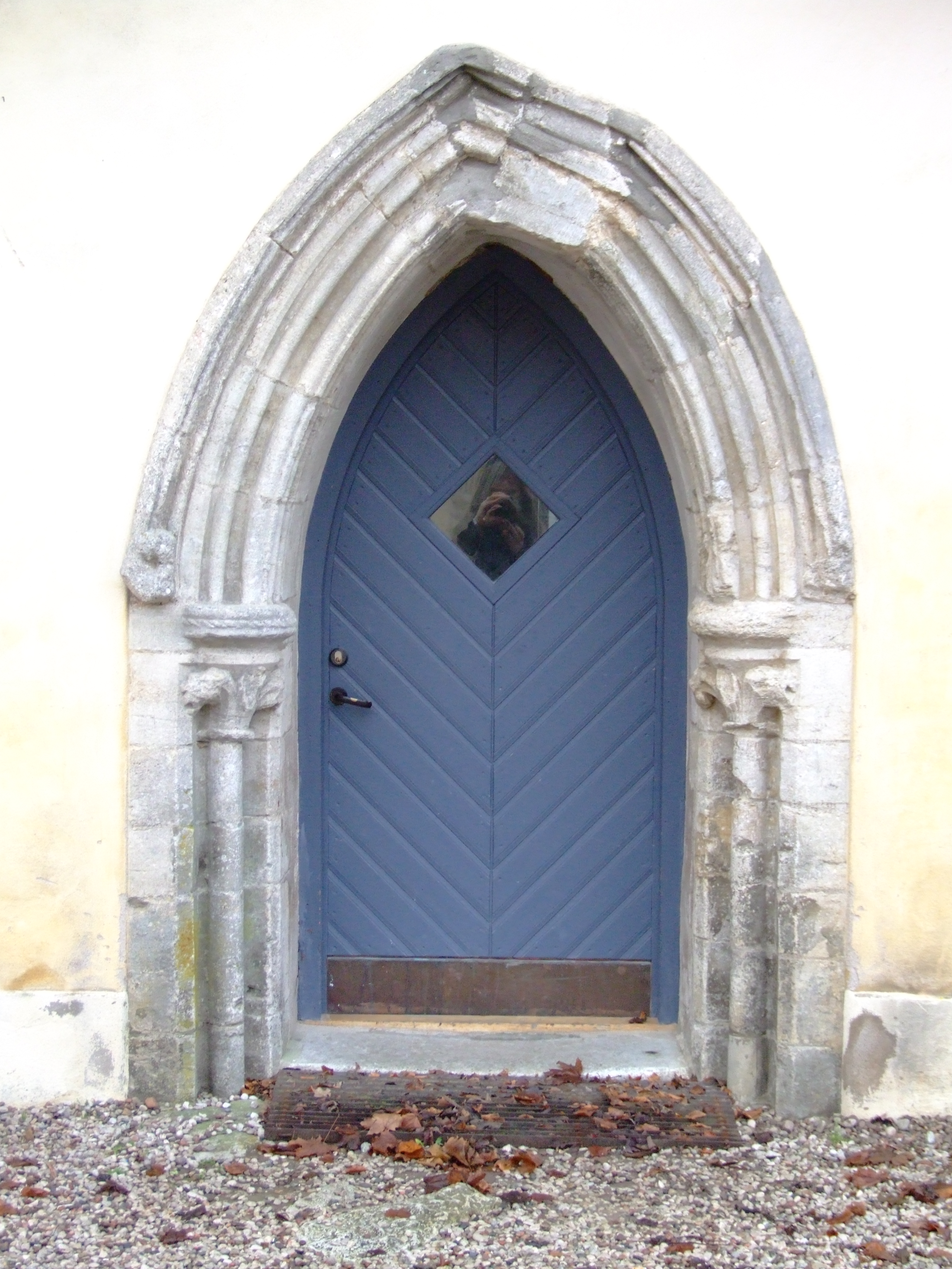 Roma kungsgård, Gotland.